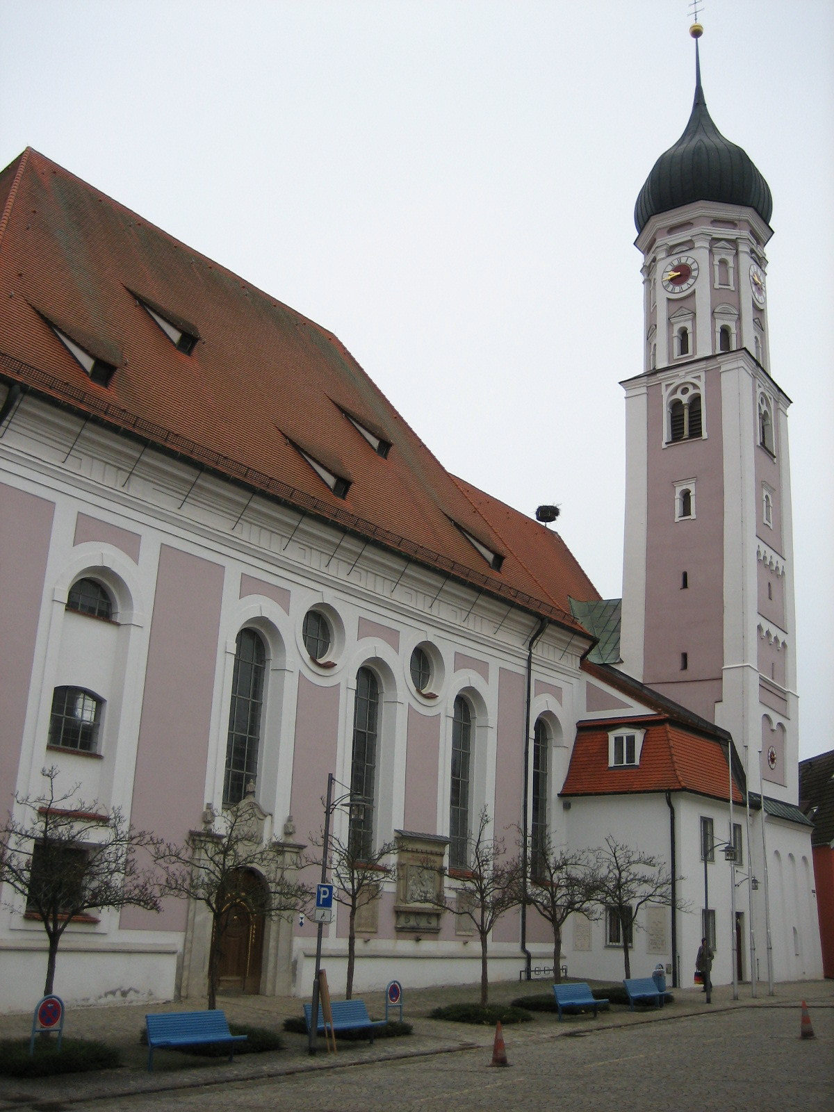 Burgau in Schwaben, Stadtpfarrkirche